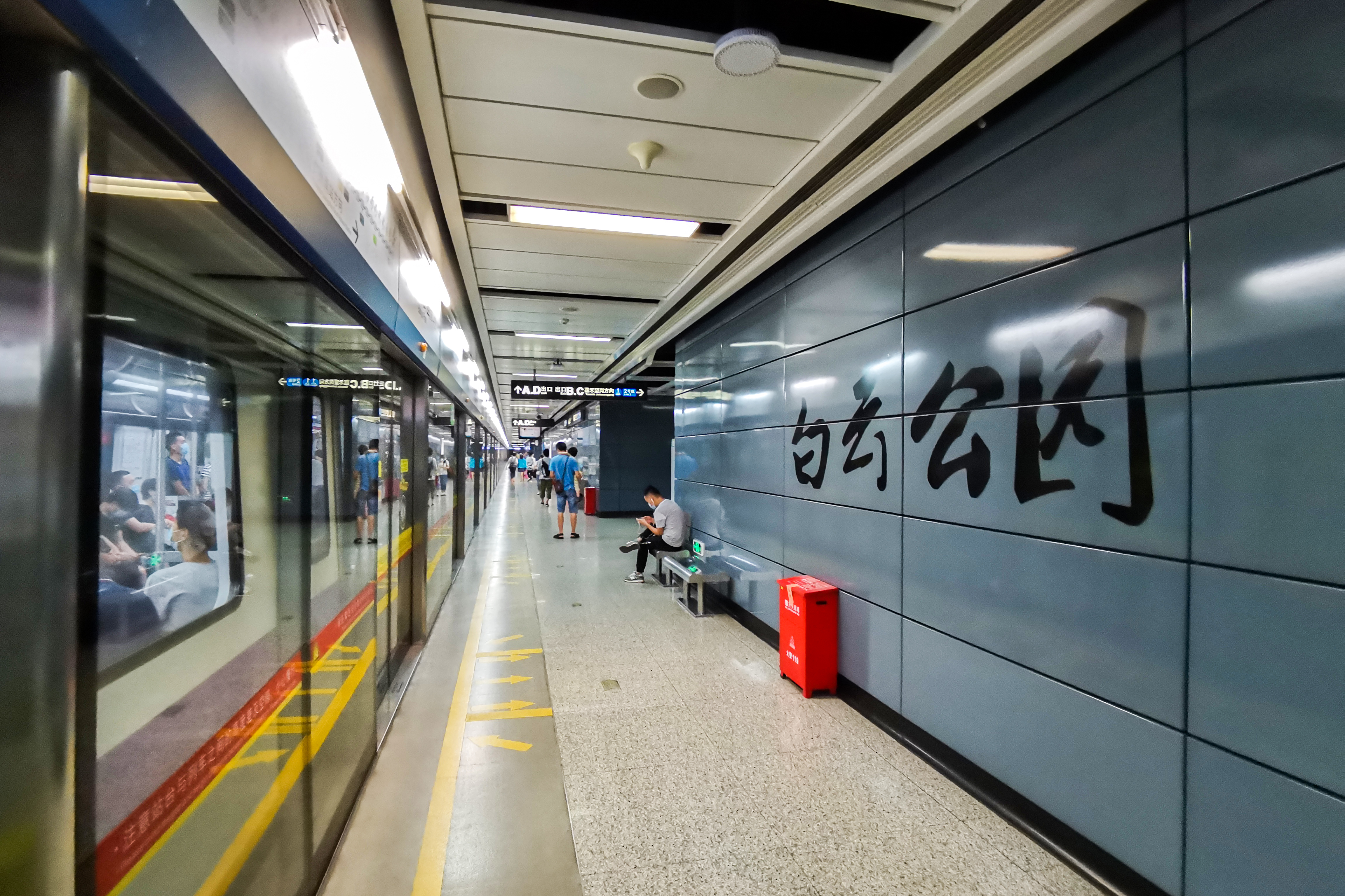 广州地铁白云公园站